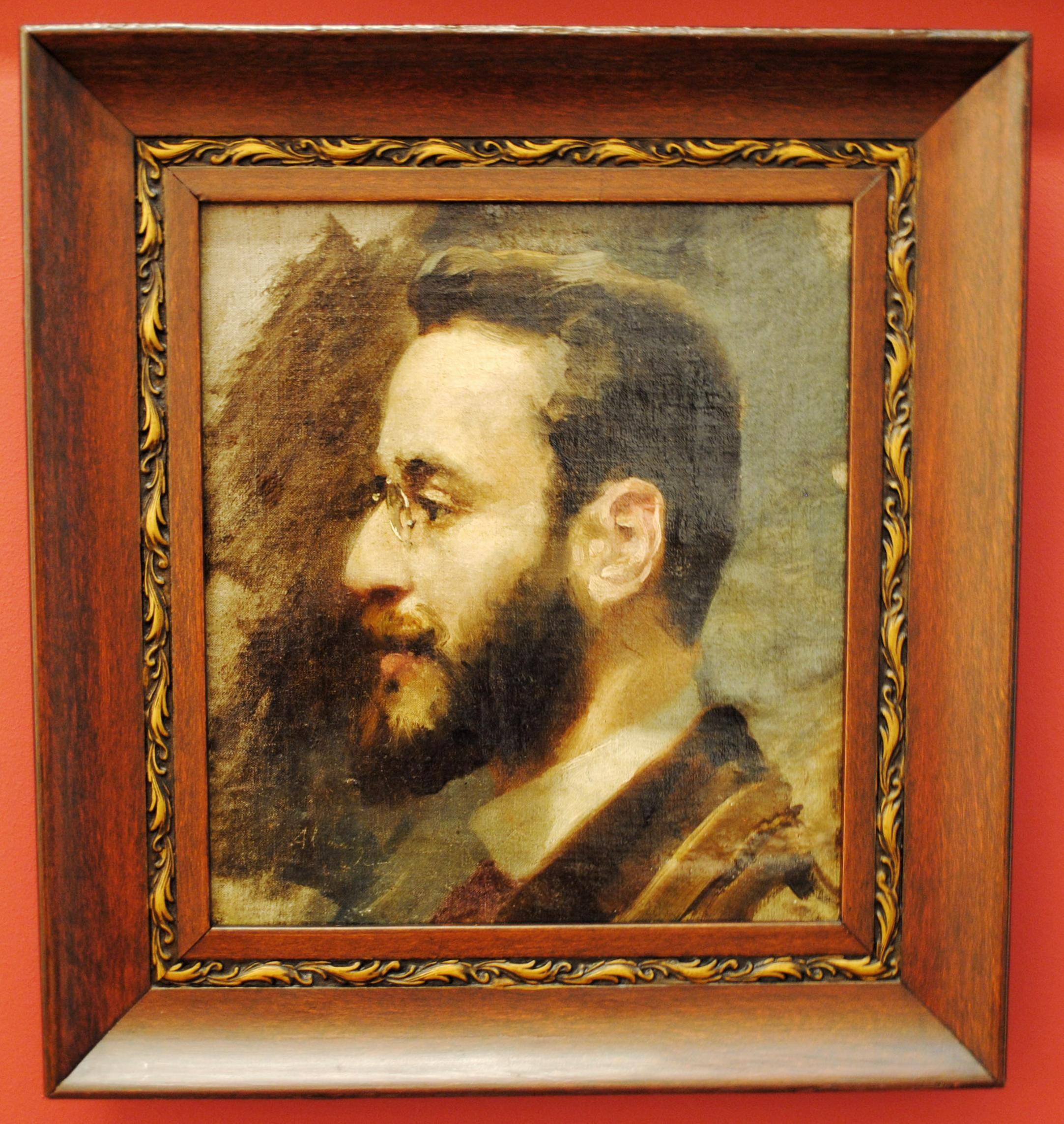 Vexa o título e as categorías.